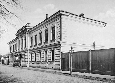 127. Женскiй домъ трудолюбiя имени С. Н. и М. А. Горбовыхъ въ Б. Харитоньевскомъ пер.